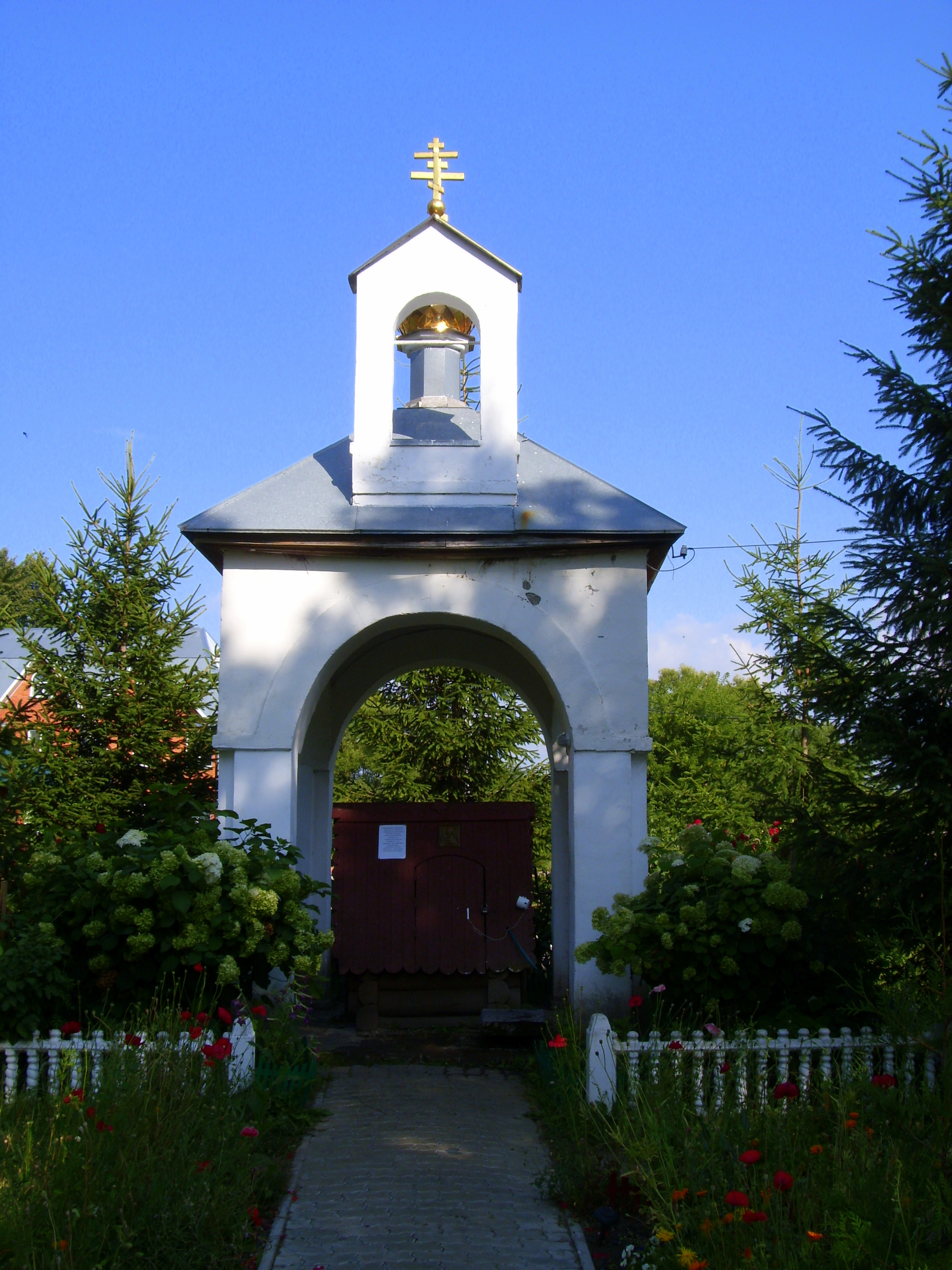 Одрин-Николаевский монастырь (Брянская область, Карачев, д. Одрин)